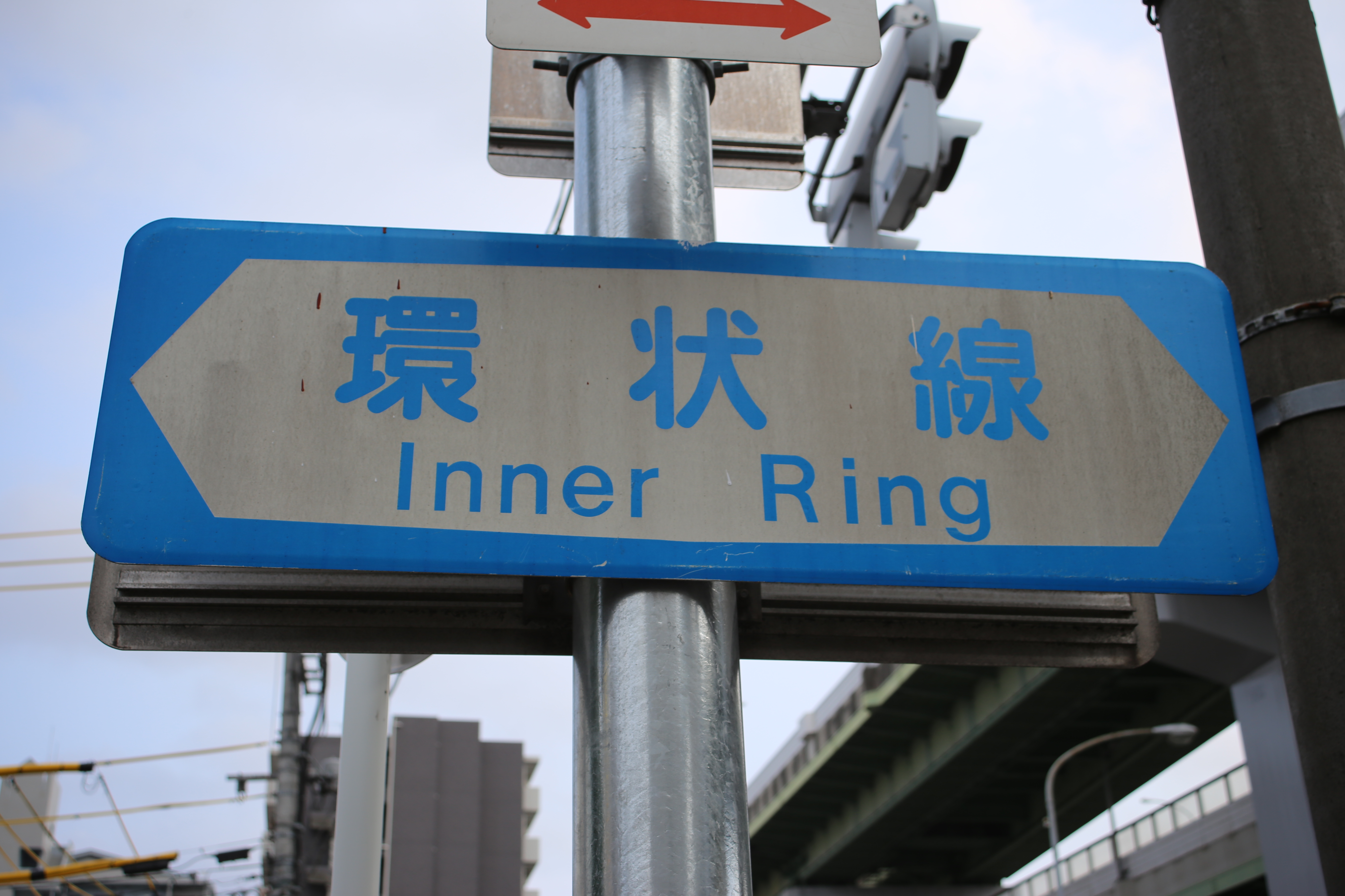 名古屋市道名古屋環状線の名称を示す看板